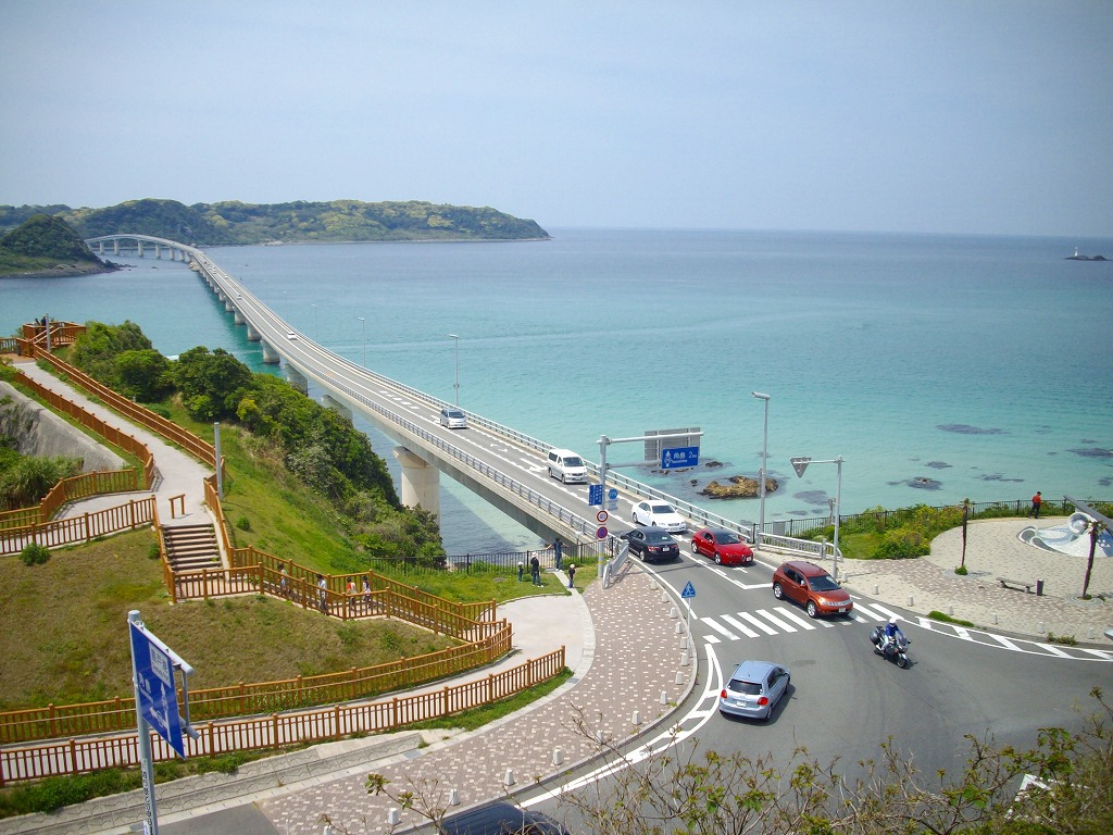 角島大橋 Tsunoshima Bridge